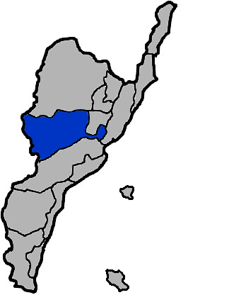 本圖係小籃子為編輯臺灣省臺東縣延平鄉所改繪，感謝KJ提供原圖。